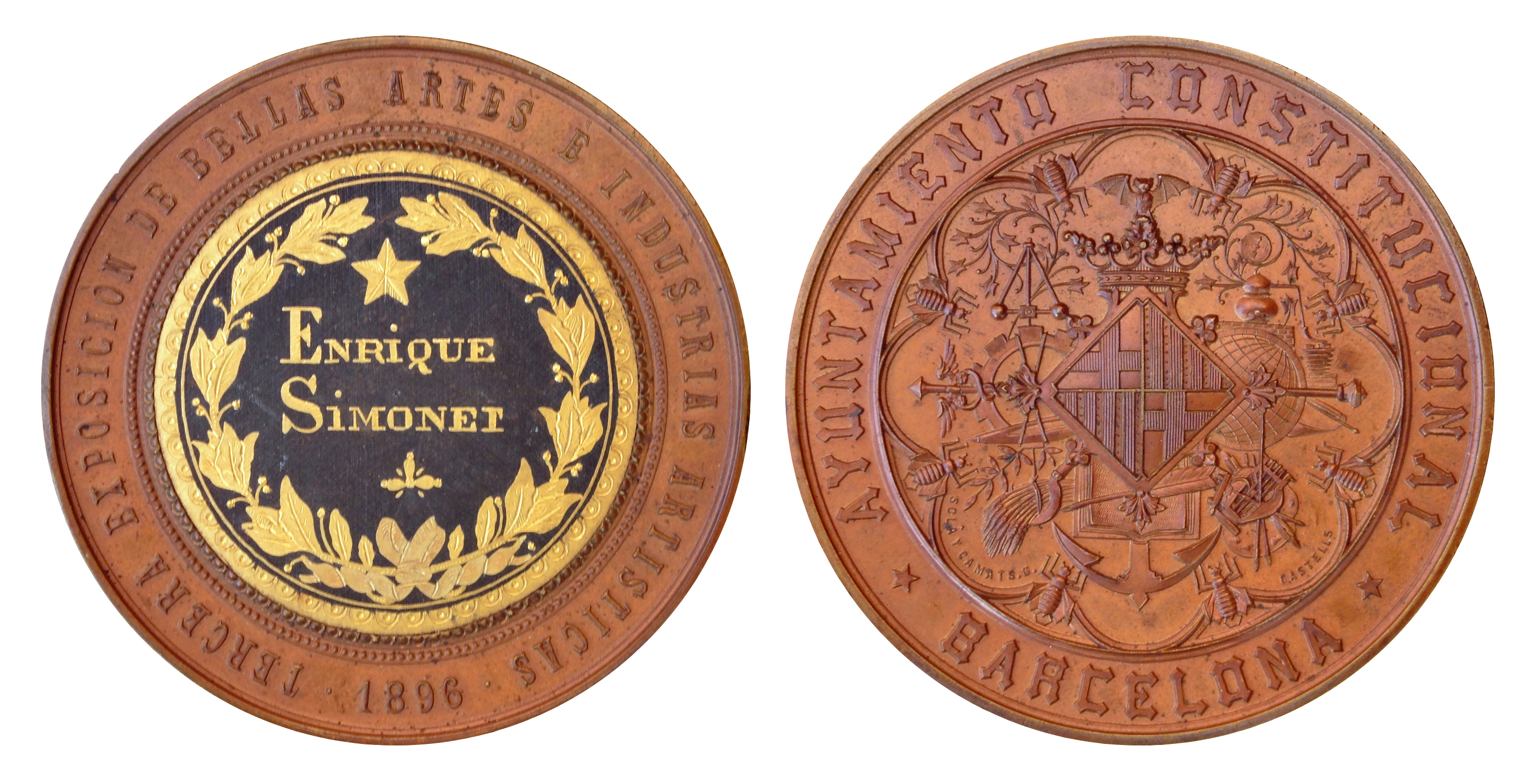 Medalla de primera clase concedida a Enrique Simonet, en la tercera Exposición de Bellas Artes e Industrias Artísiticas de Barcelona en 1896, por su obra Flevit super illam. Ficha en la página del Museo del Prado